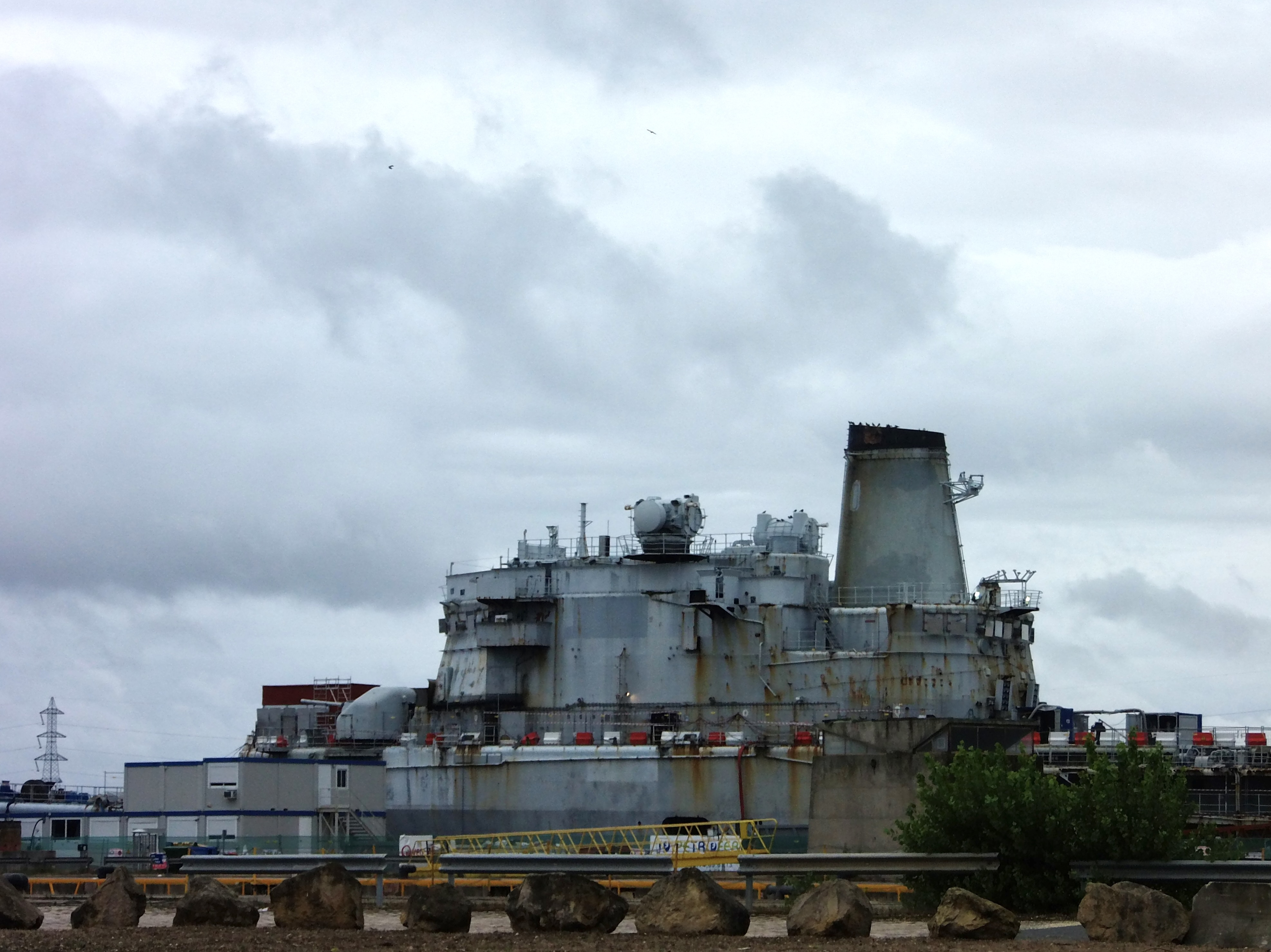 La Jeanne d'Arc (porte-hélicoptères) en déconstruction au port de Bassens (Gironde, France). Ancien bâtiment de la Marine nationale française, porte-hélicoptère et navire-école. Arrivé de Brest le 14 octobre 2014.